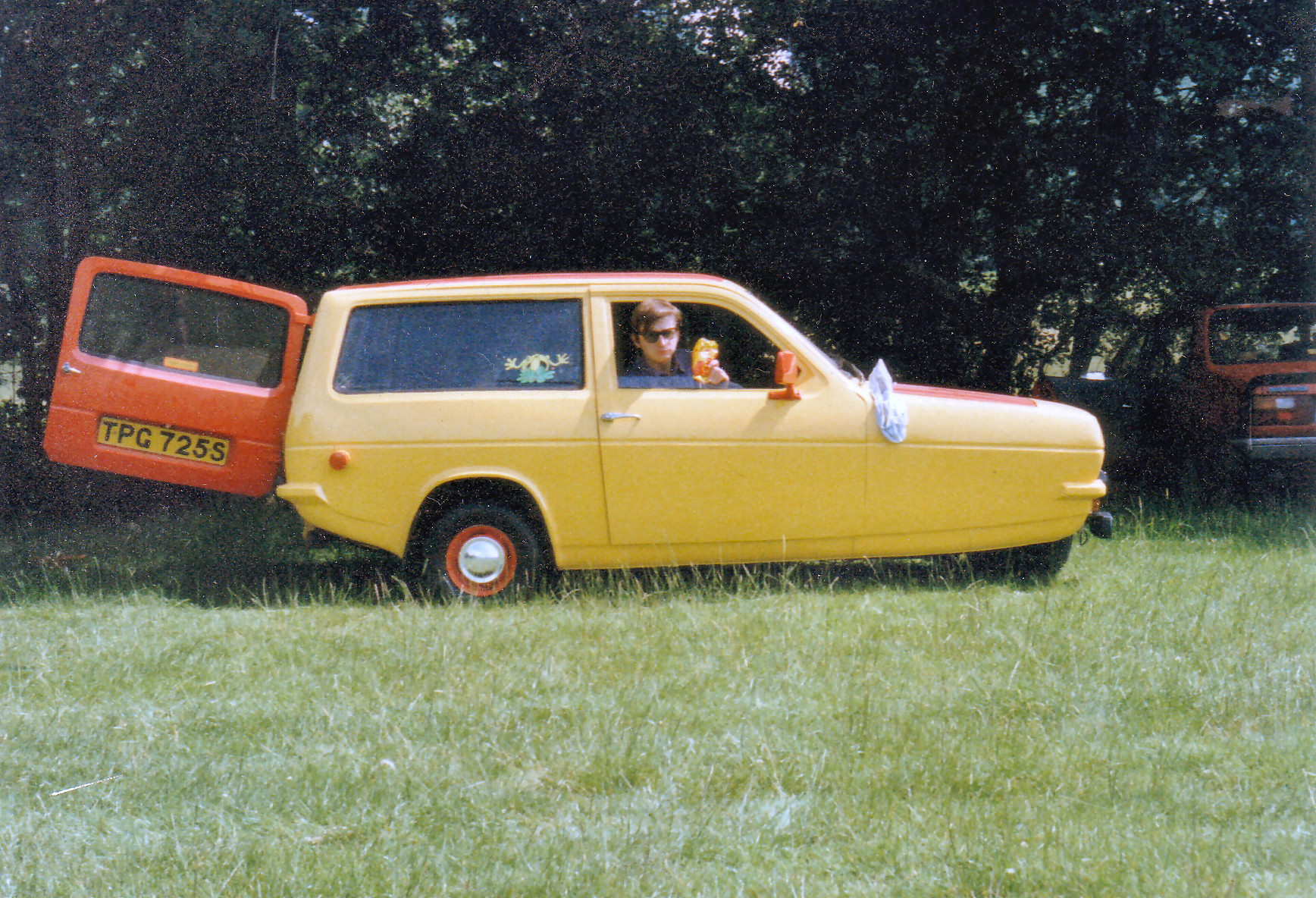 Reliant Robinbob_rialto_reliant